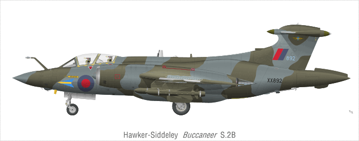 Hawker-Siddeley Buccaneer S Mk.2B XX892